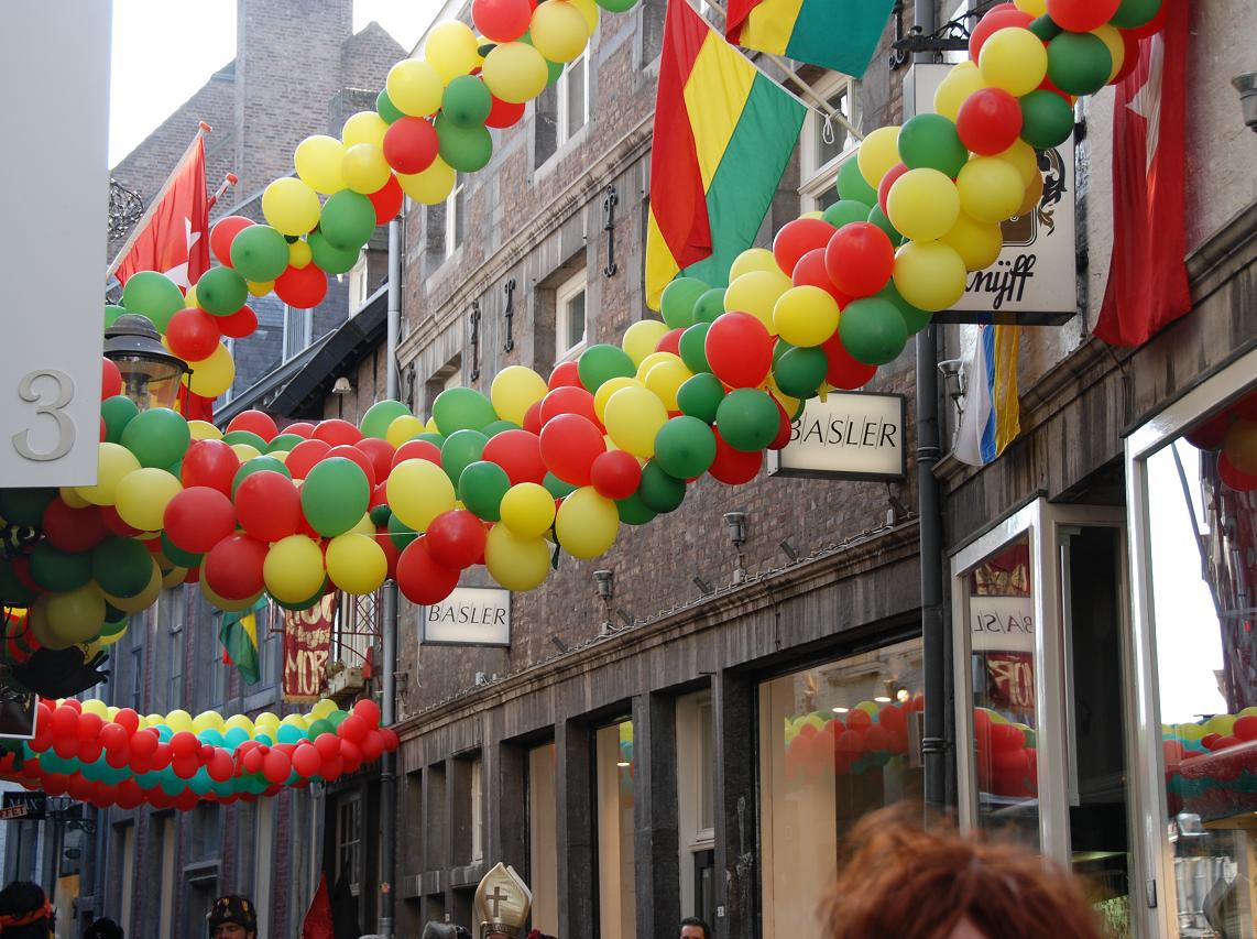 Limburgs: Carnavalsversering